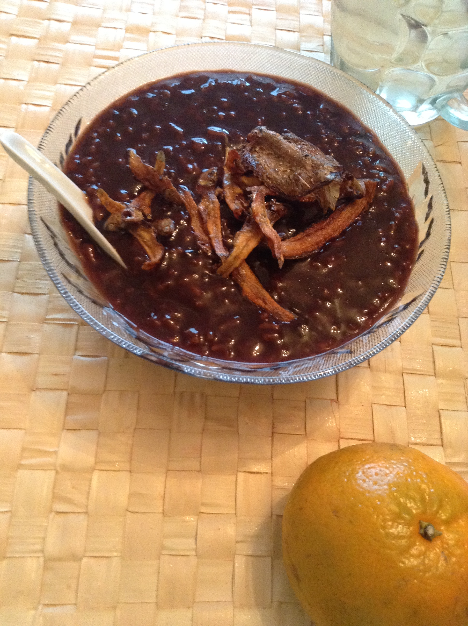 Tagalog: Sa mangkok, may tsampurado na may maliliit na isda.